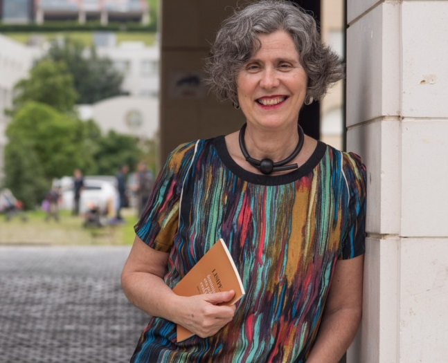 Foto de Mari Luz Esteban